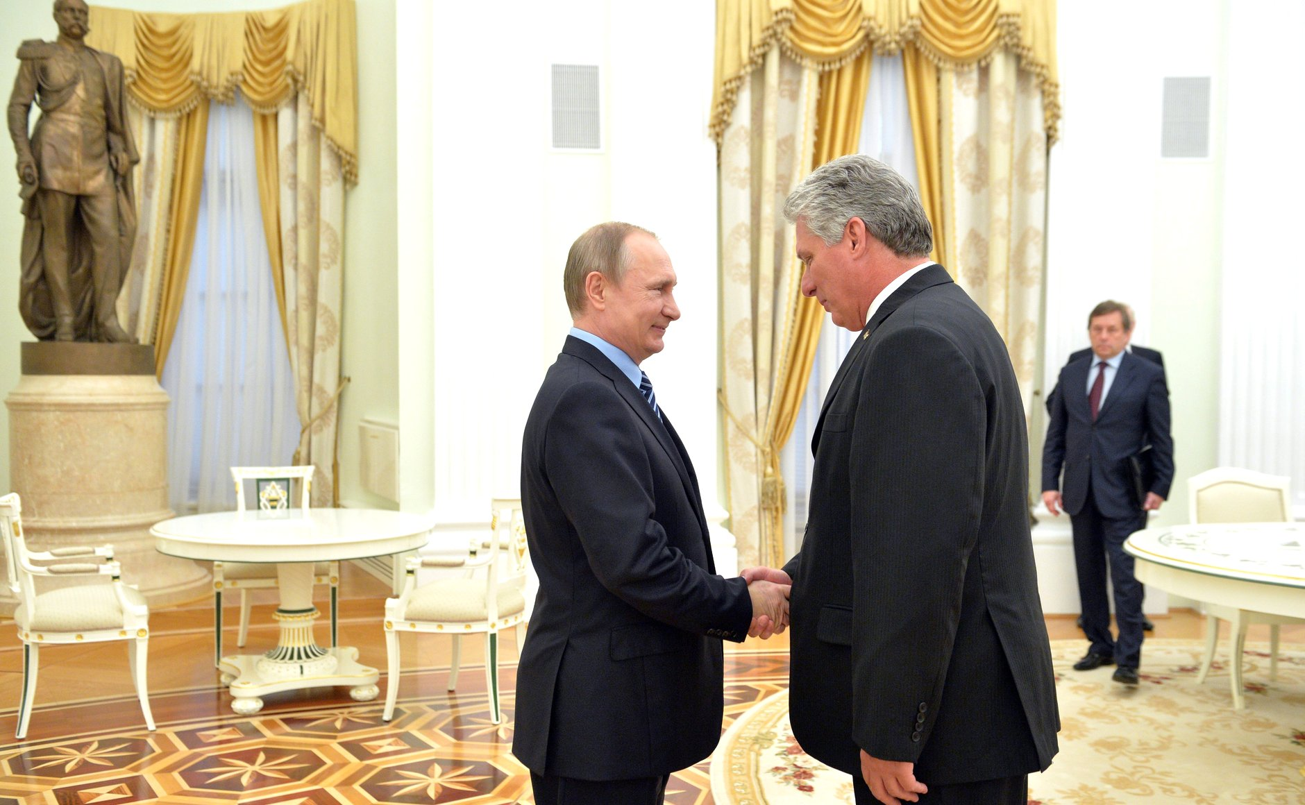 Встреча Президента России Владимира Путина с Первым заместителем Председателя Государственного Совета и Совета Министров Республики Куба Мигелем Диас-Канелем Бермудесом